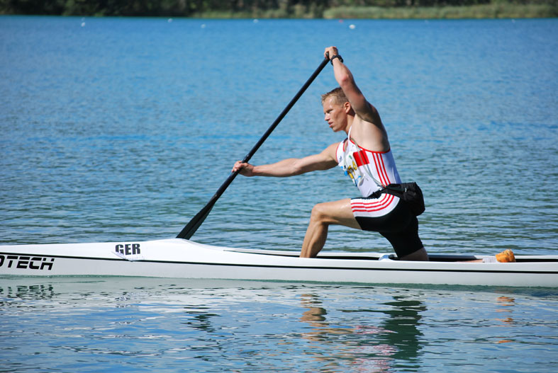 Kanumarathon WM in Banyoles/Spanien